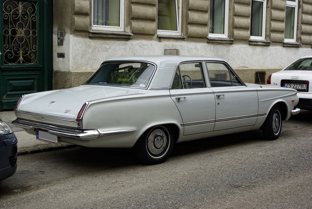 1964 Plymouth Valiant